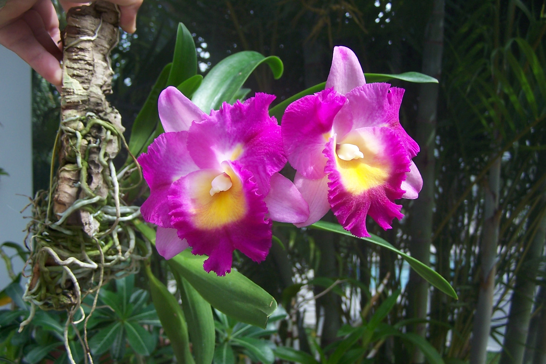 Otaara Hwa Yuan Bay